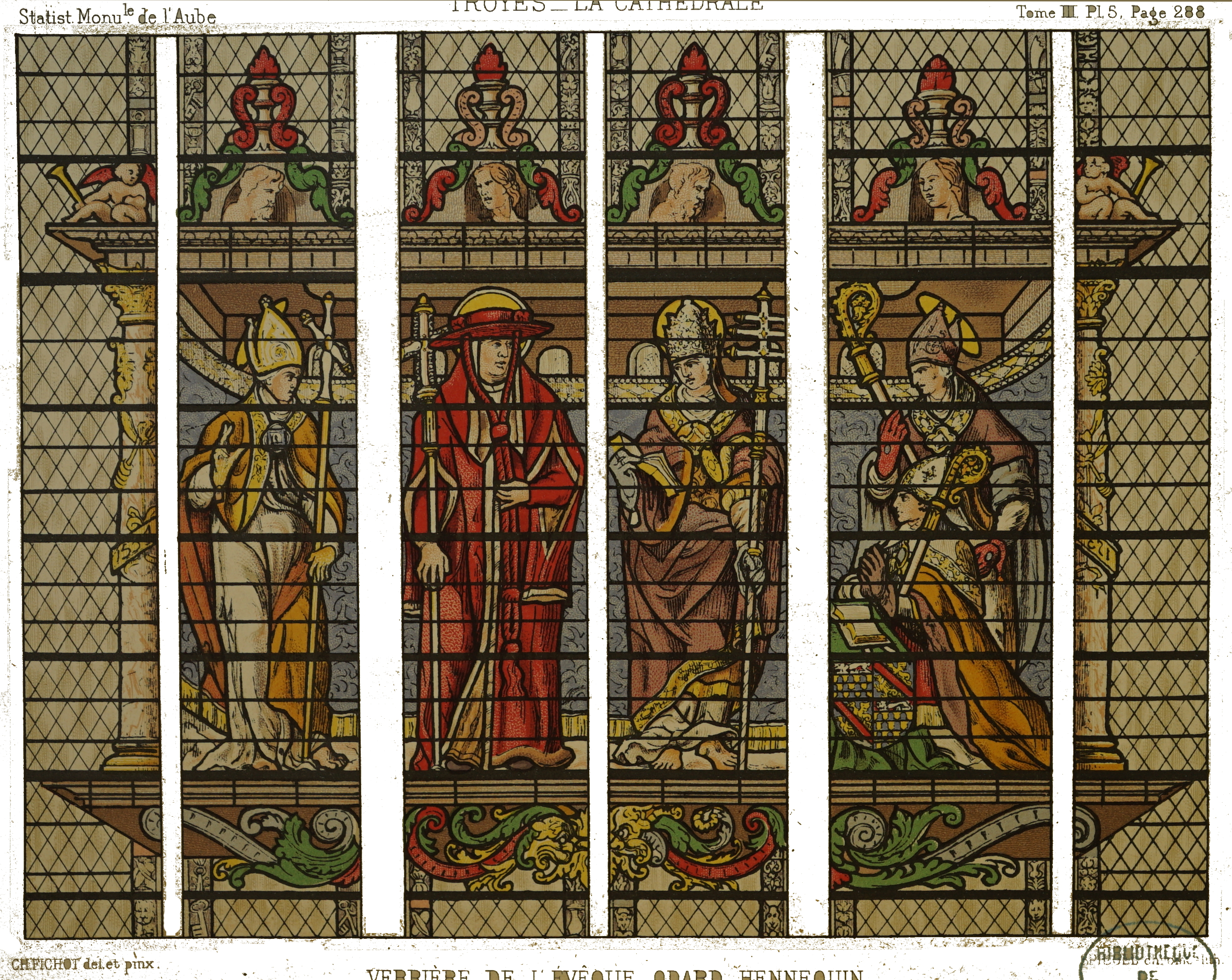 par un dessin de Fichot.